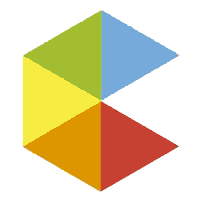 Símbolo de la campaña para diputado de Gabriel Boric en las elecciones parlamentarias de Chile de 2013.